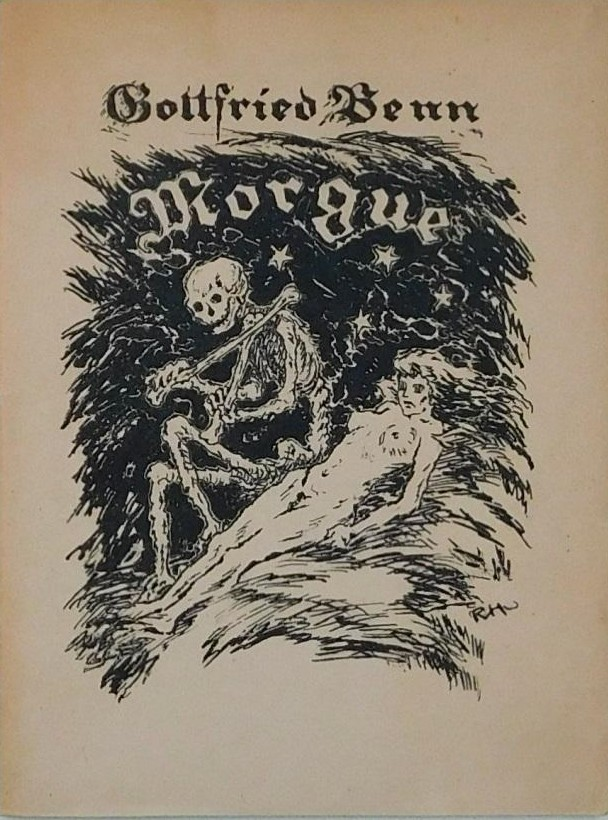 Gottfried Benn: Morgue und andere Gedichte. München, Verlag der Bücherwinkel, 1923. Umschlagzeichnung von Rolf von Hoerschelmann. Gedruckt in 300 handschriftlich numerierten Exemplaren